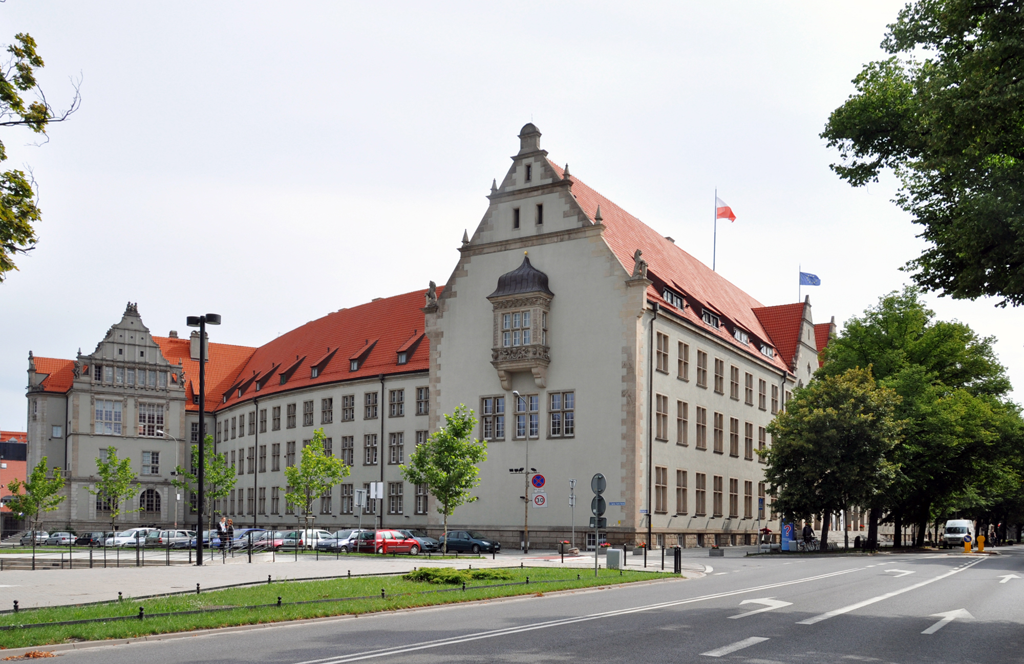 Wrocław - Budynek Główny Politechniki Wrocławskiej, A1